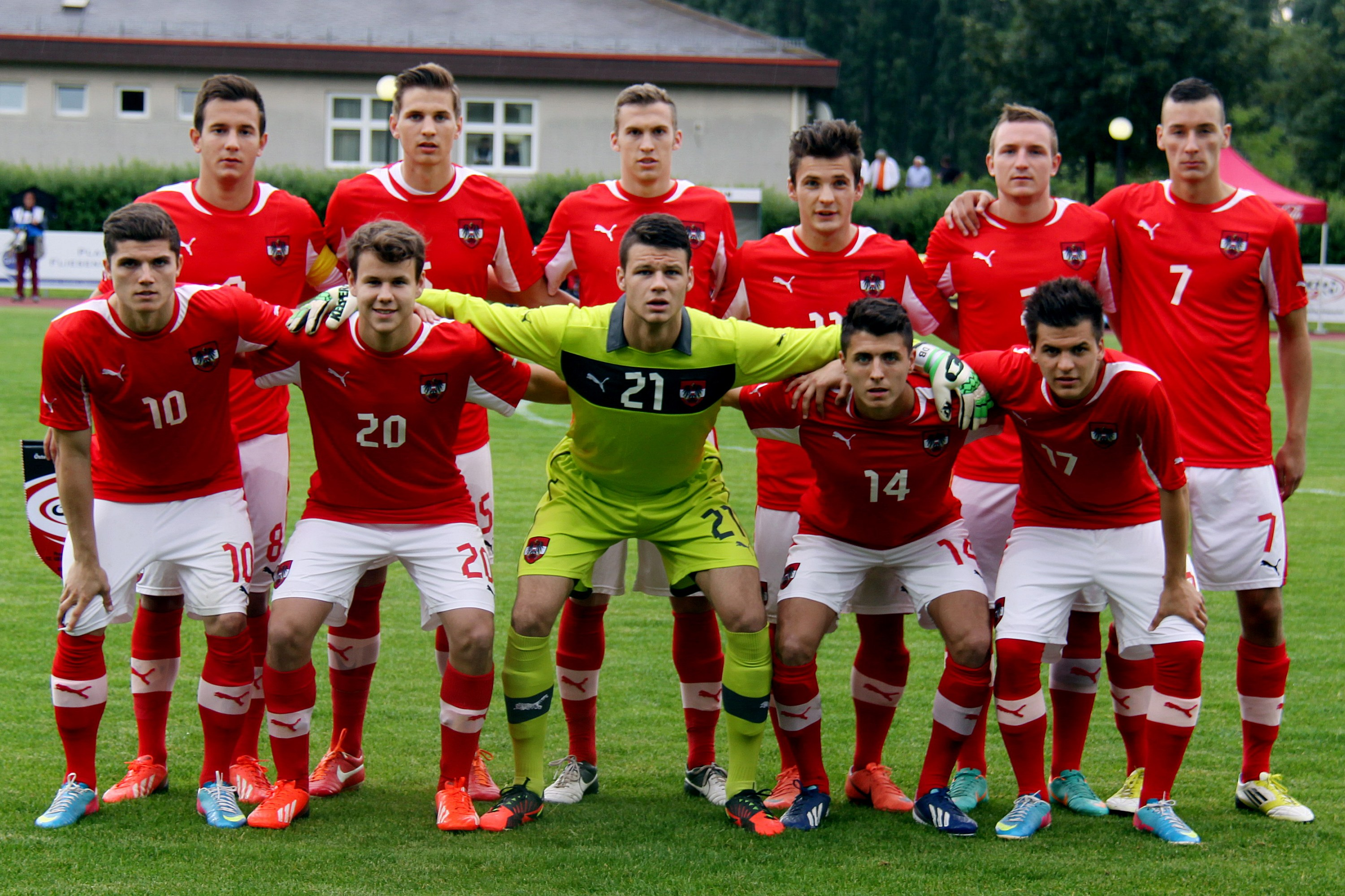 Qualifikationsspiel zur U-19 Fußball-Europameisterschaft: Österreich] gegen Frankreich am 10. Juni 2013 (0:1)] in Traiskirchen.] - Das Foto zeigt von Links nach rechts, hintere Reihe: Christian Gartner, Sebastian Wimmer, Lukas Jäger, Christoph Martschinko, Philip Posch, Dominik Wydra; vordere Reihe: Marcel Sabitzer, Louis Schaub, Daniel Bachmann, Alessandro Schöpf und Thomas Murg. en Qualification for the 2013 UEFA European Under-19 Football Championship qualification Austria vs. France (0:1) on 2013-2013-06-10 in Traiskirchen. – The photo shows from left to right, 2nd row Christian Gartner, Sebastian Wimmer, Lukas Jäger, Christoph Martschinko, Philipp Posch, Dominik Wydra; 1st row: Marcel Sabitzer, Louis Schaub, Daniel Bachmann, Alessandro Schöpf and Thomas Murg.